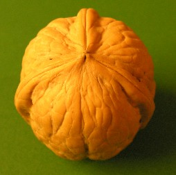 Juglans regia, fructus, frutto tripartito